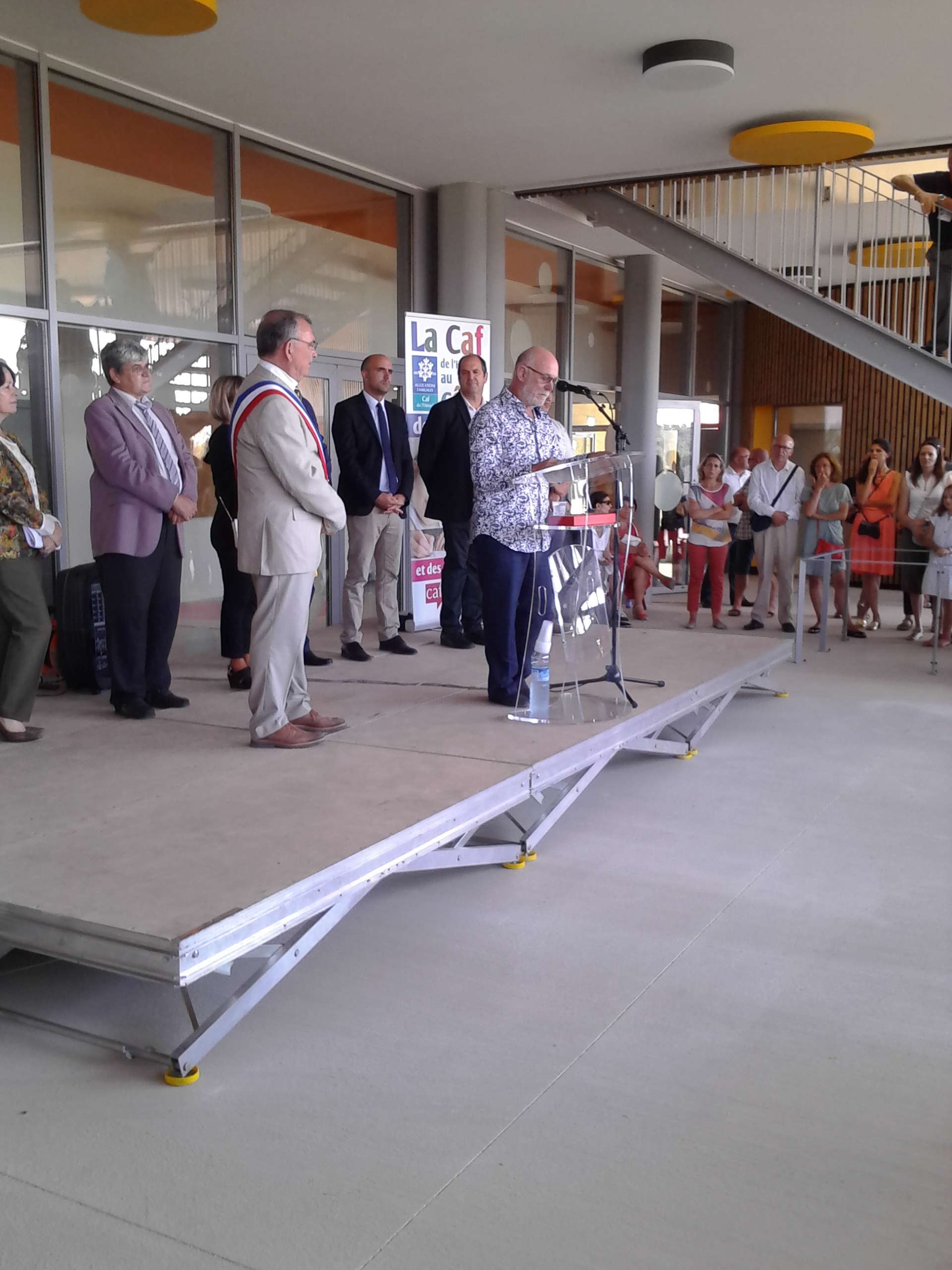 Nissan-lez-Enserune (Hérault) - Inauguration de l'école Antoine Beille en présence d'un descendant d'Antoine Beille